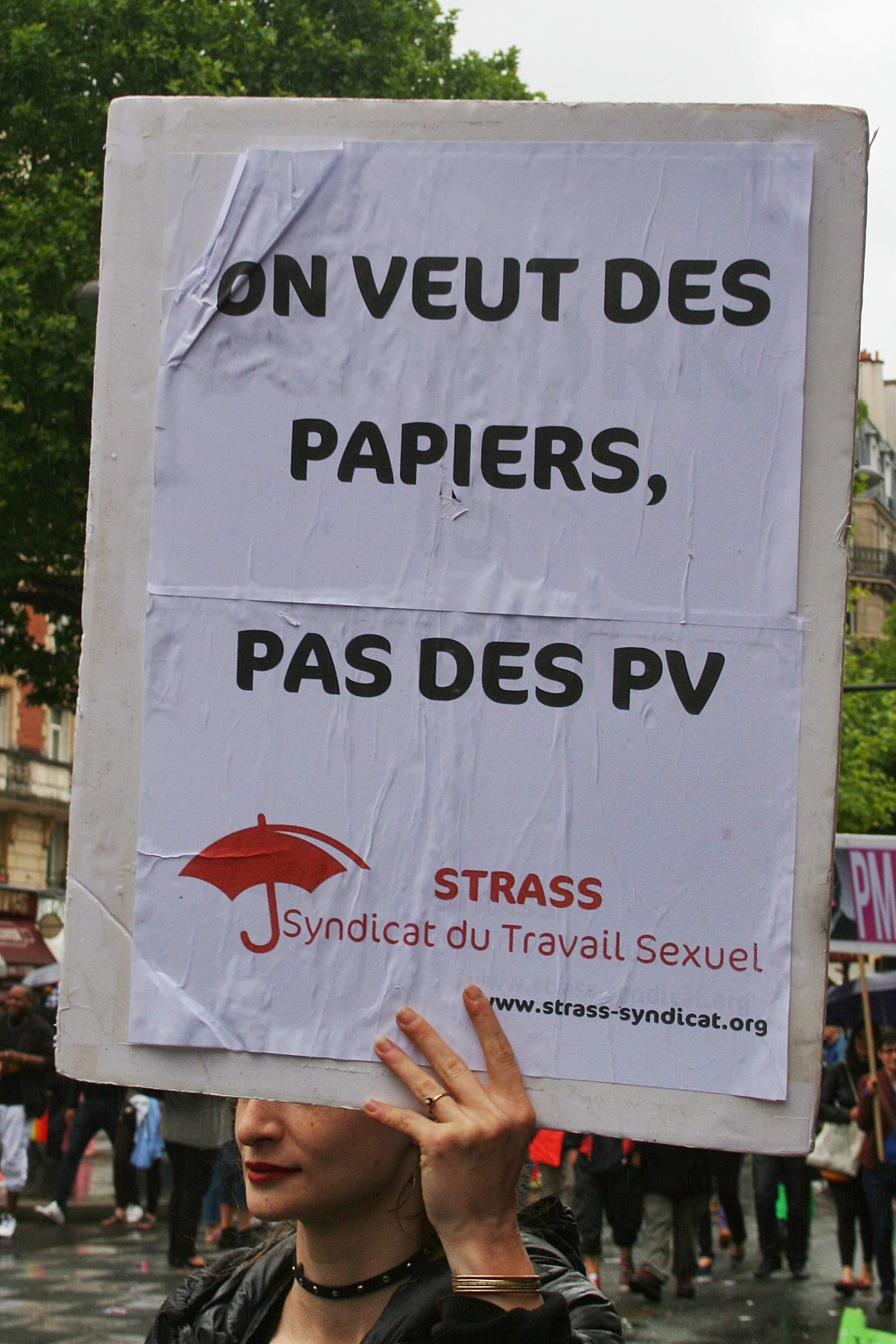 Photos de la Marche des Fiertés LGBT de Paris, le 28 Juin 2014